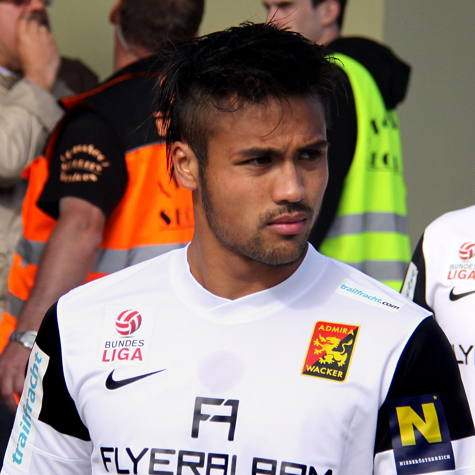 Meisterschaftsspiel der österreichischen Bundesliga: SV Mattersburg gegen FC Admira Wacker Mödling am 26. Mail 2013 (0:0)] im Mattersburger Pappelstadion.] - Das Foto zeigt.